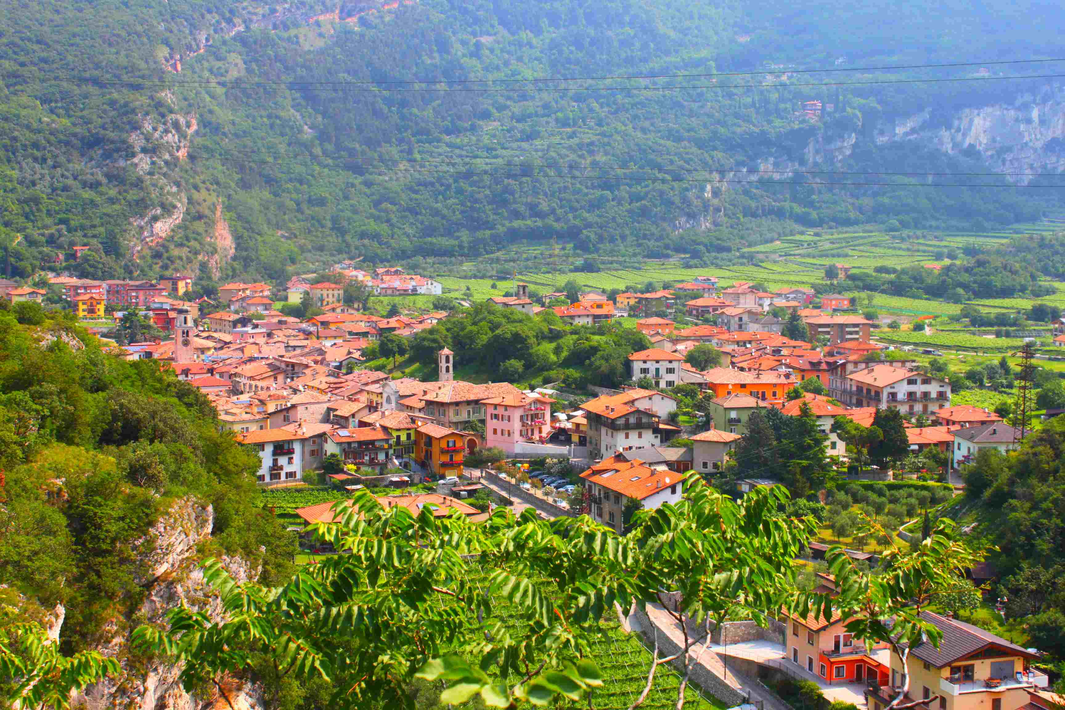 Nago von Castel Penede aus gesehen